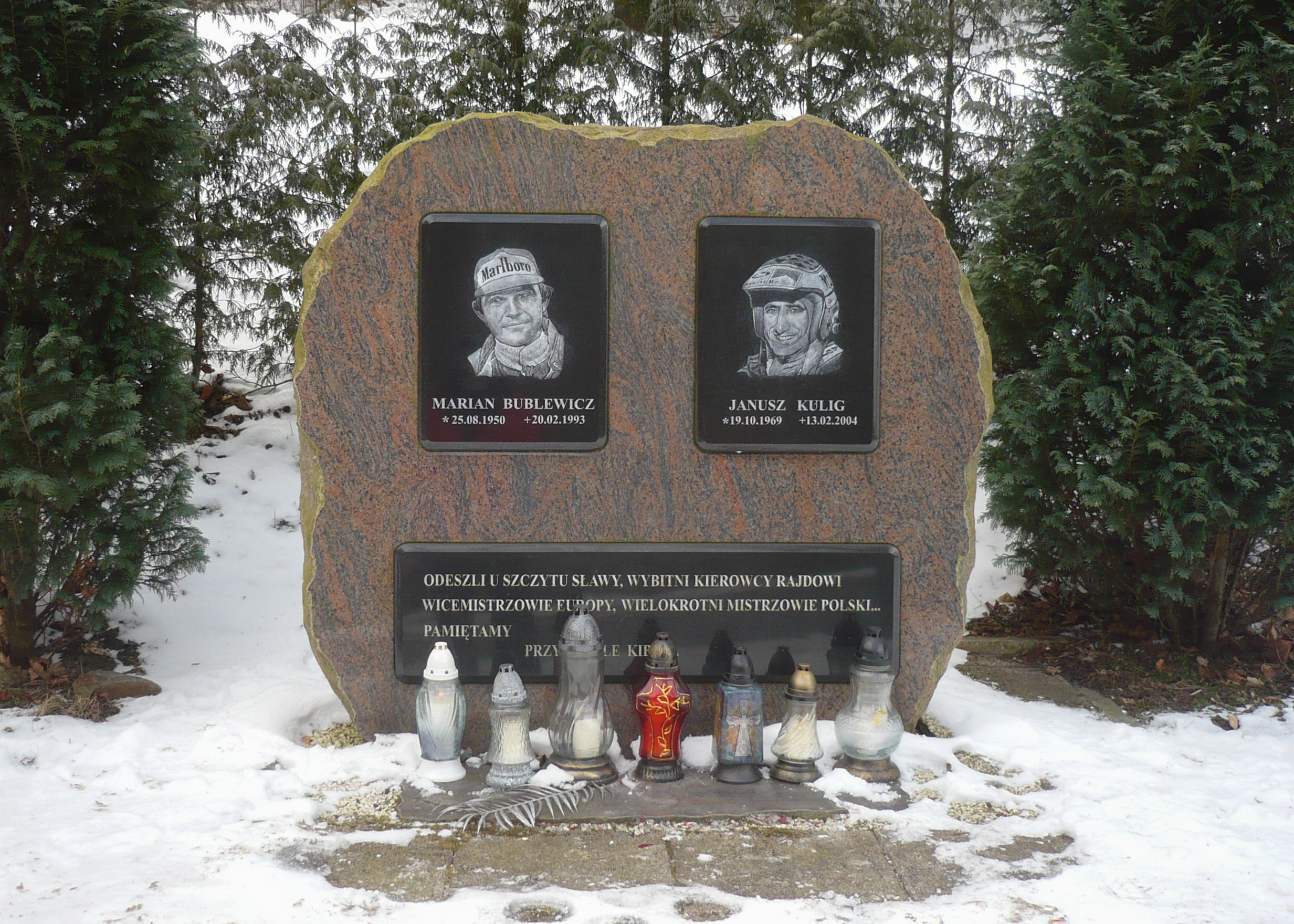 Walim. Pomnik kierowców rajdowych Mariana Bublewicza i Janusza Kuliga.